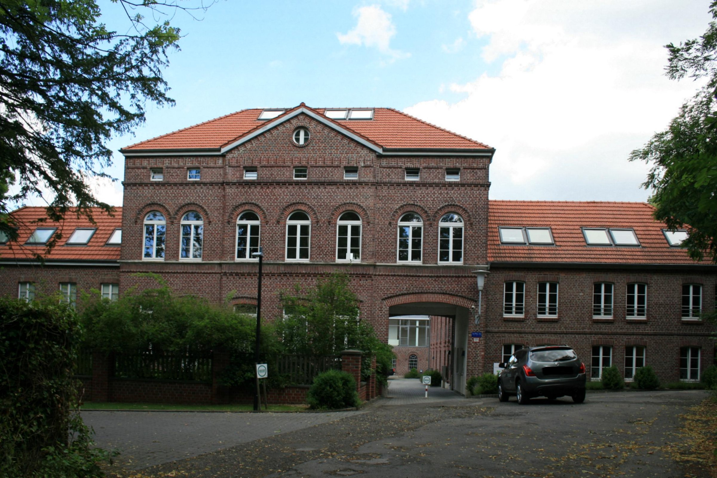 Wassermühle in der Stadt Mönchengladbach